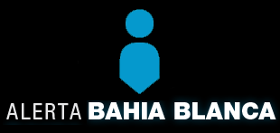 Isotipo de Alerta Tigre (maqueta)